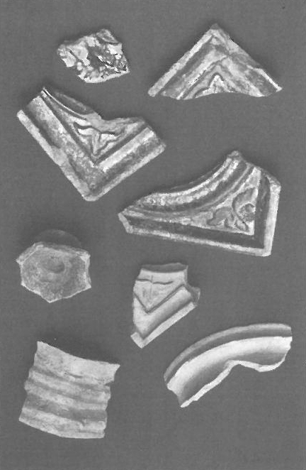 Funde in der Baugrube des Rathausneubaues